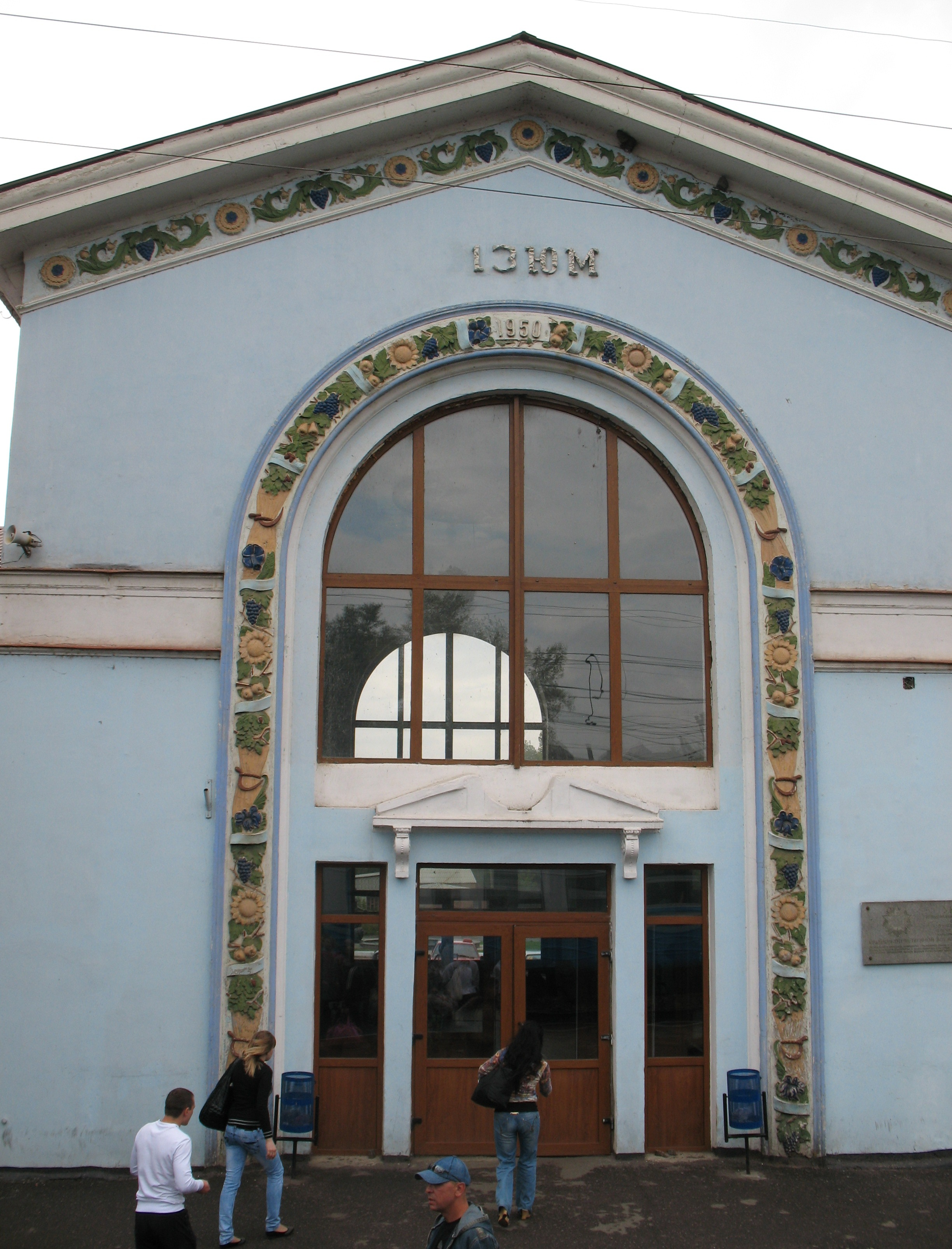 Ж.д. вокзал города Изюма. Вид с платформы. Центральный вход.